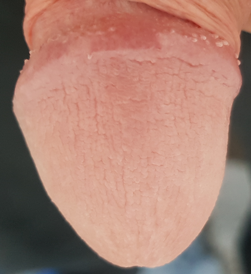 Balanitis Circinata during Pimecrolimus treatment shows nearly no symptoms